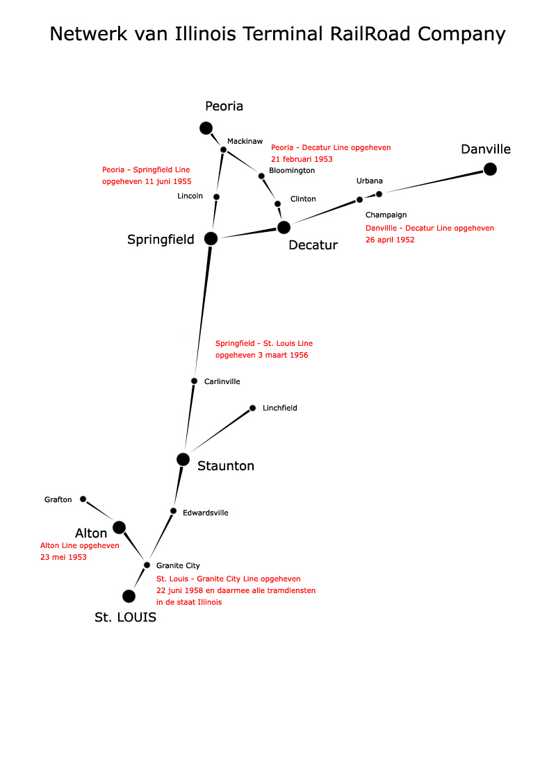 Zelfgemaakte media in Photoshop 7